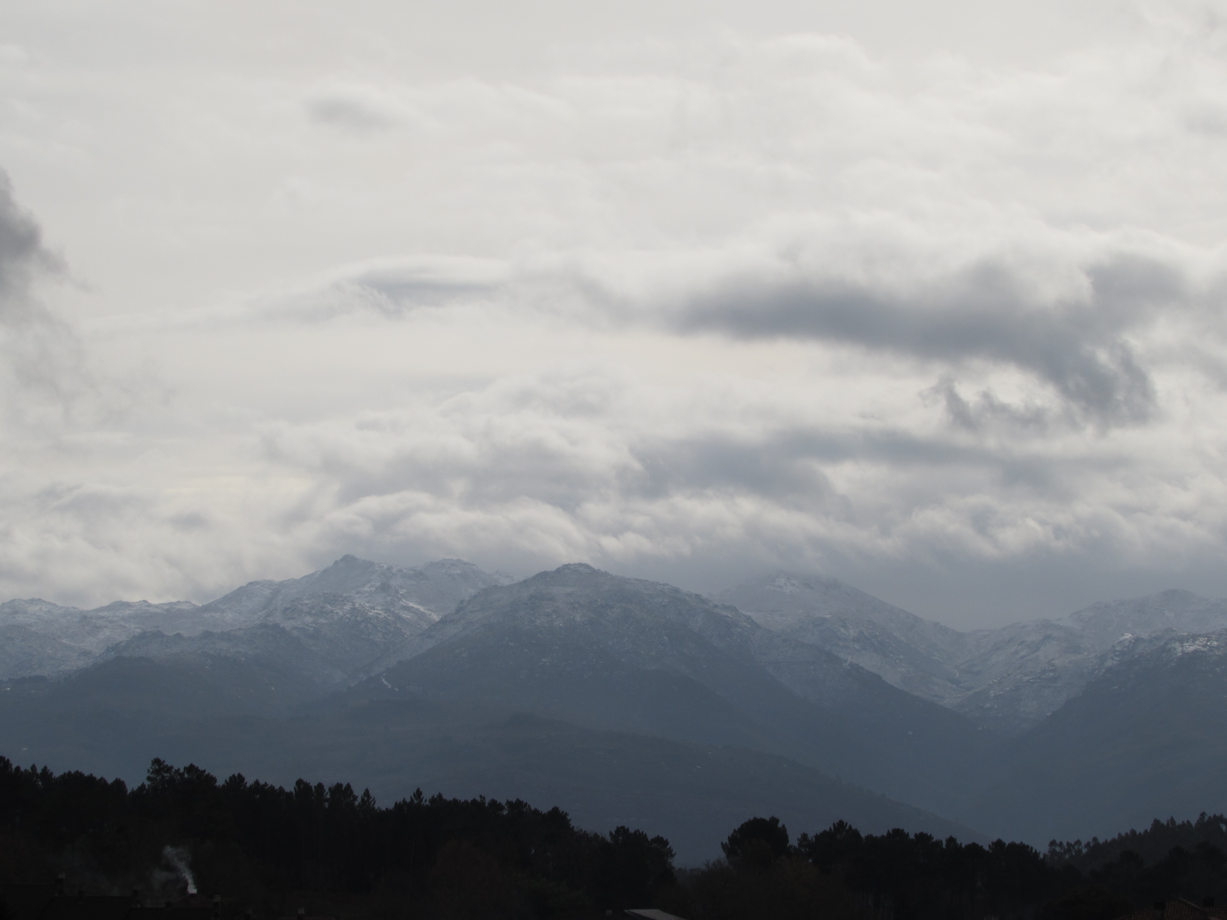 Vista da Serra do Xurés nevada.